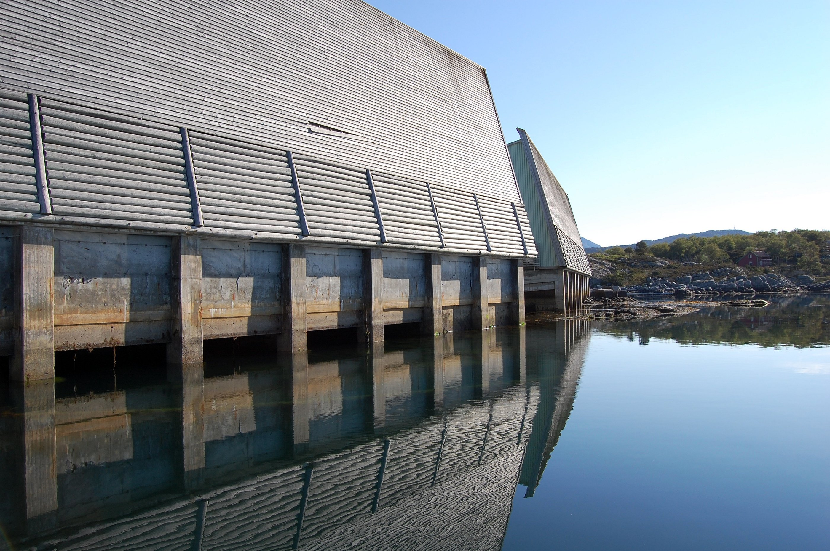 Kystmuseet